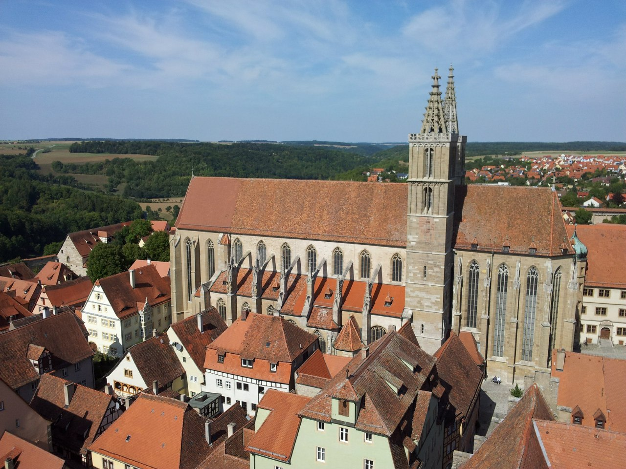 Церковь